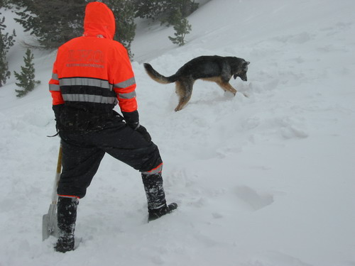 lawine training